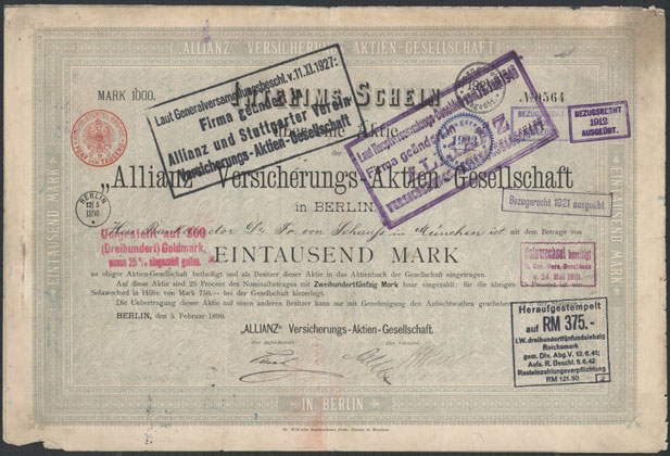 Interims-Schein einer Aktie über 1000 Mark der Allianz Versicherungs-AG vom 5. Februar 1890